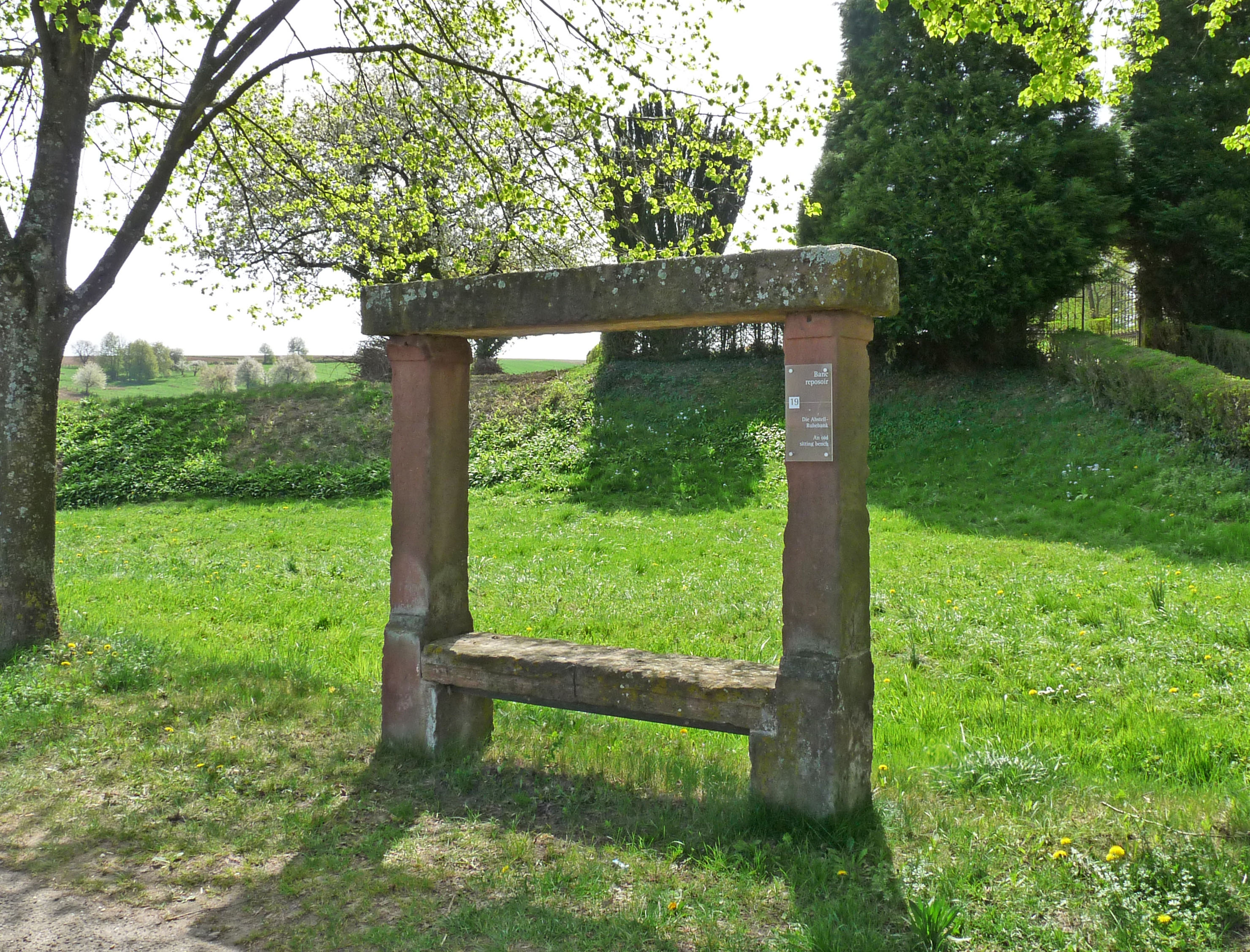 Banc-reposoir napoléonien en grès sur une aire de repos à l'entrée de Merkwiller-Pechelbronn (Bas-Rhin), en venant de Kutzenhausen.